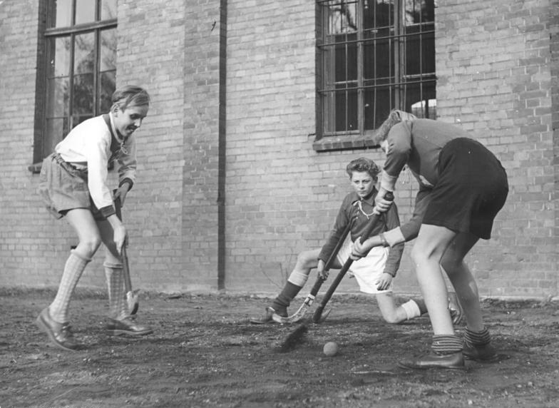 Zentralbild Garbeth-Halle 18.1.1956 Der Spielmannszug der Schloßschule Köthen. In einem Gebäudeteil des durch den Hitlerkrieg teilweise zerstörten jahrhundertealten Köthener Schlosses zog nach 1945 eine Schule ein. Hier wurde am 1.September 1953 mit 30 Schülern ein Spielmannszug gegründet, der schon nach einem Jahr Bestehen Sieger des Bezirkes Halle wurde. Intensiv bereiten sich der Spielmannszug unter der erfahrenen Leitung seines Leiters, des Lehrers Heinz Burk, auf das II. Pioniertreffen 1955 in Dresden vor. Der Erfolg blieb nicht aus; der Spielmannszug ging im Republiksausscheid in Dresden als Sieger hervor. Heute gehören ihm 60. Schüler an, und seine Leistungen verbessern sich ständig. Unterstützt und gefördert wird der Spielmannszug von der Volkspolizeidienststelle, die in einem anderen Teil des Schlosses untergebracht ist, und die Patenschaft über die Schule übernommen hat. Auf vielgestaltige Weise verbringen die Mitglieder des Spielmannszuges ihre Freizeit. Hoffnungsvoller Nachwuchs für die Köthener Hockey-Oberliga-Mannschaft. Hockey ist in Köthen die am stärksten vertetene Sportart. UBz. V.l.n.r.: "Holli" Rosenberger, Horst Langer (siehe Bild 6) und Peter Schejok wissen schon gut mit dem Hockey-Schläger umzugehen. Mit vollem Einsatz kämpfen sie um den kleinen Ball.